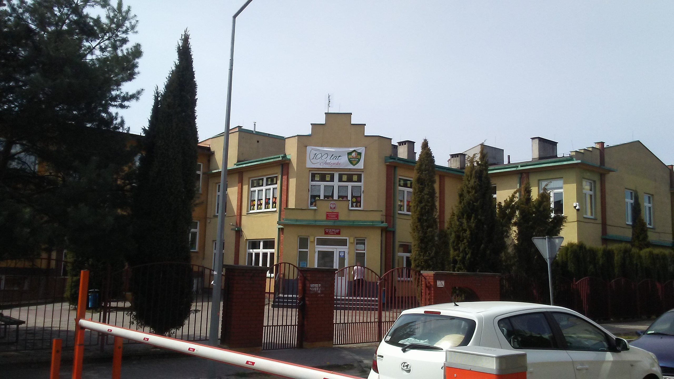 Szkoła Podstawowa 1, główne wejście, Tomaszów Mazowiecki